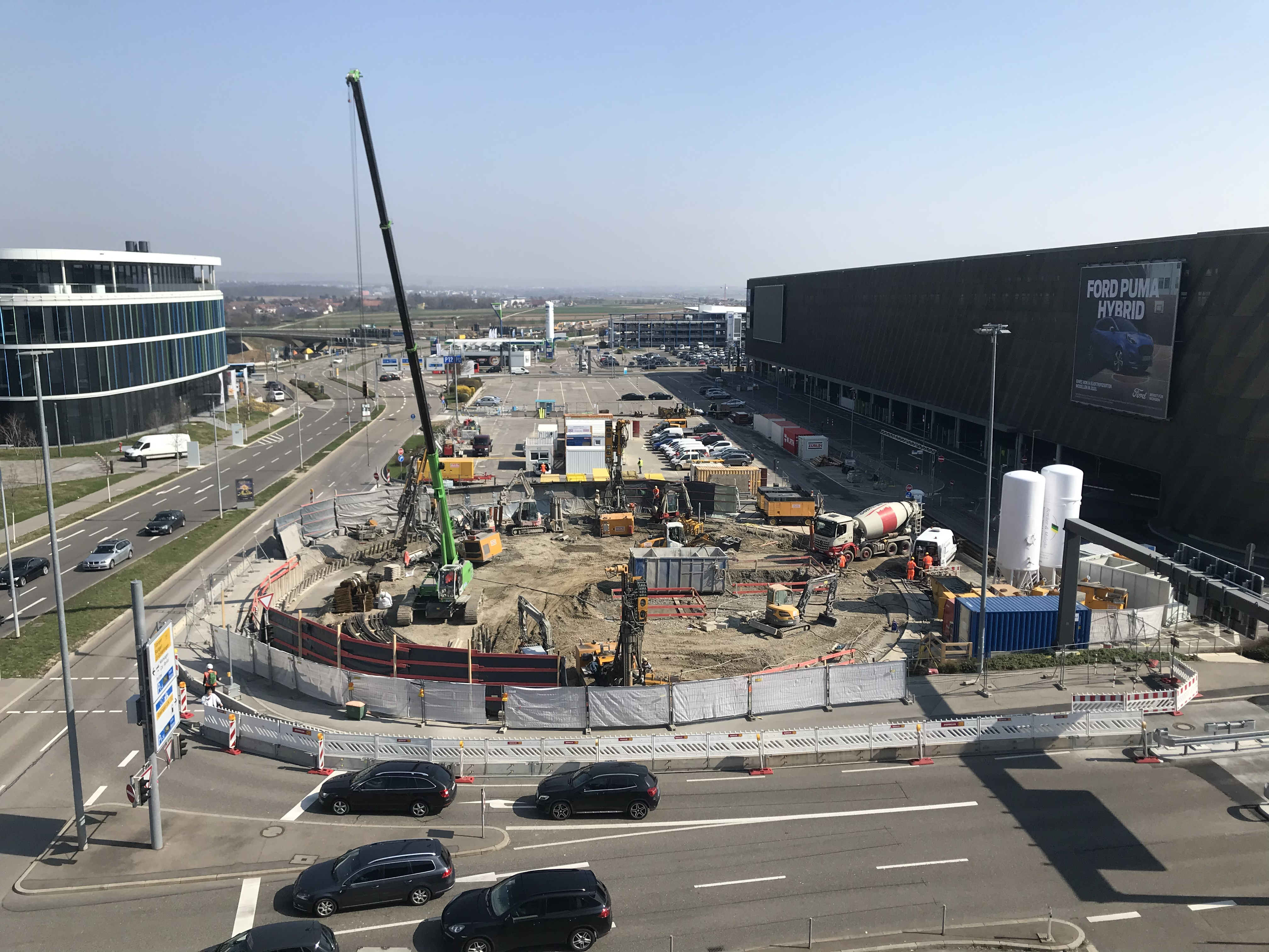 Arbeiten am künftigen Osteingang des im Rahmen von Stuttgart 21 geplanten zukünftigen Fern- und Regionalbahnhofs am Flughafen- und Messegelände (Station NBS)